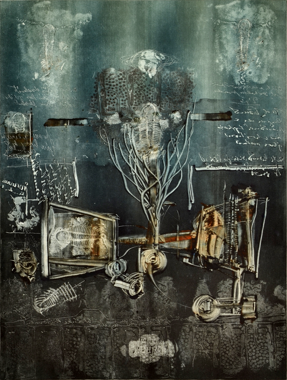 Oldřich Hamera, Ukřižovaný, monotyp, 44,5x34 cm, 1972